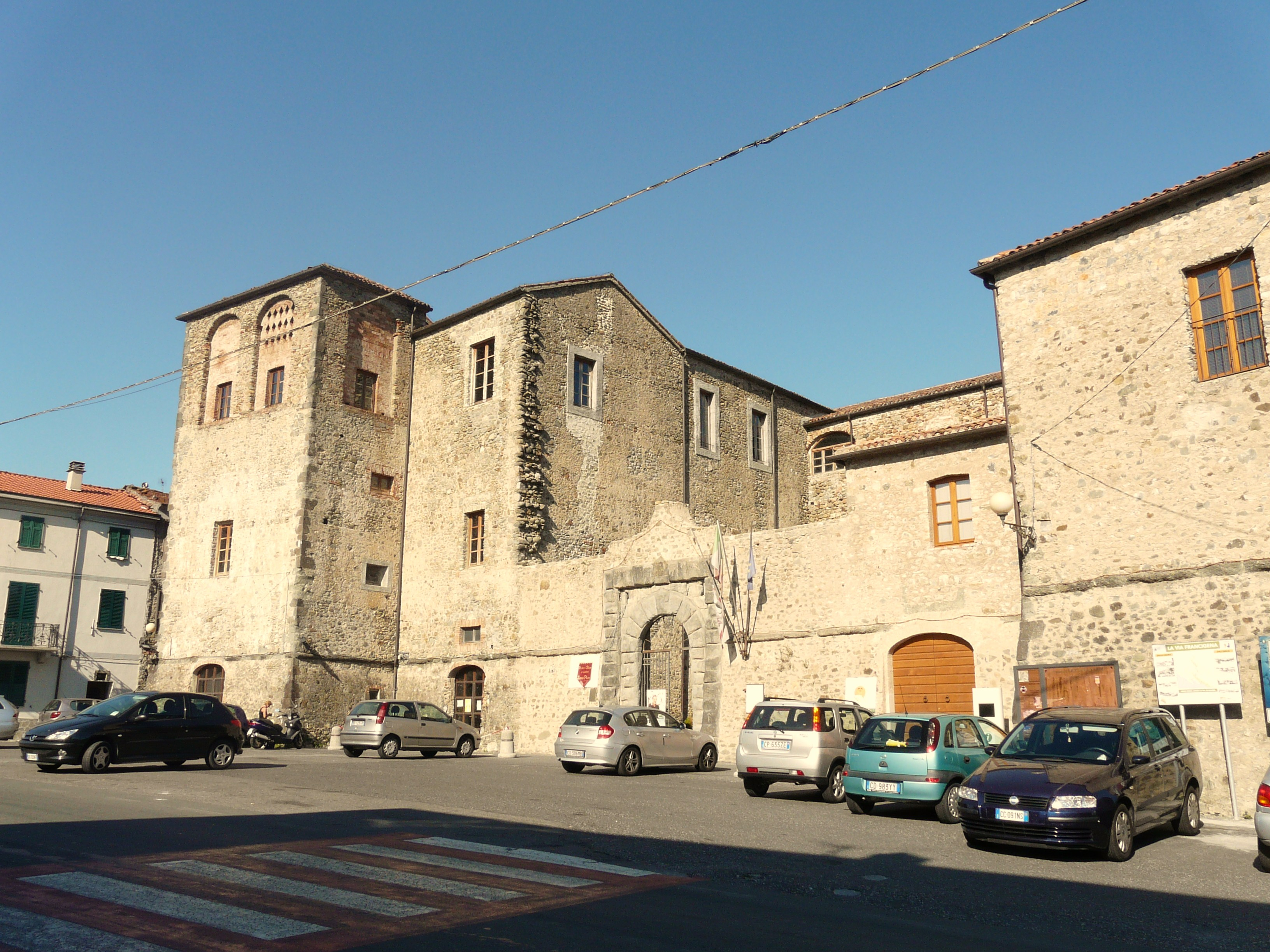 Castello di Terrarossa, Licciana Nardi, Toscana, Italia